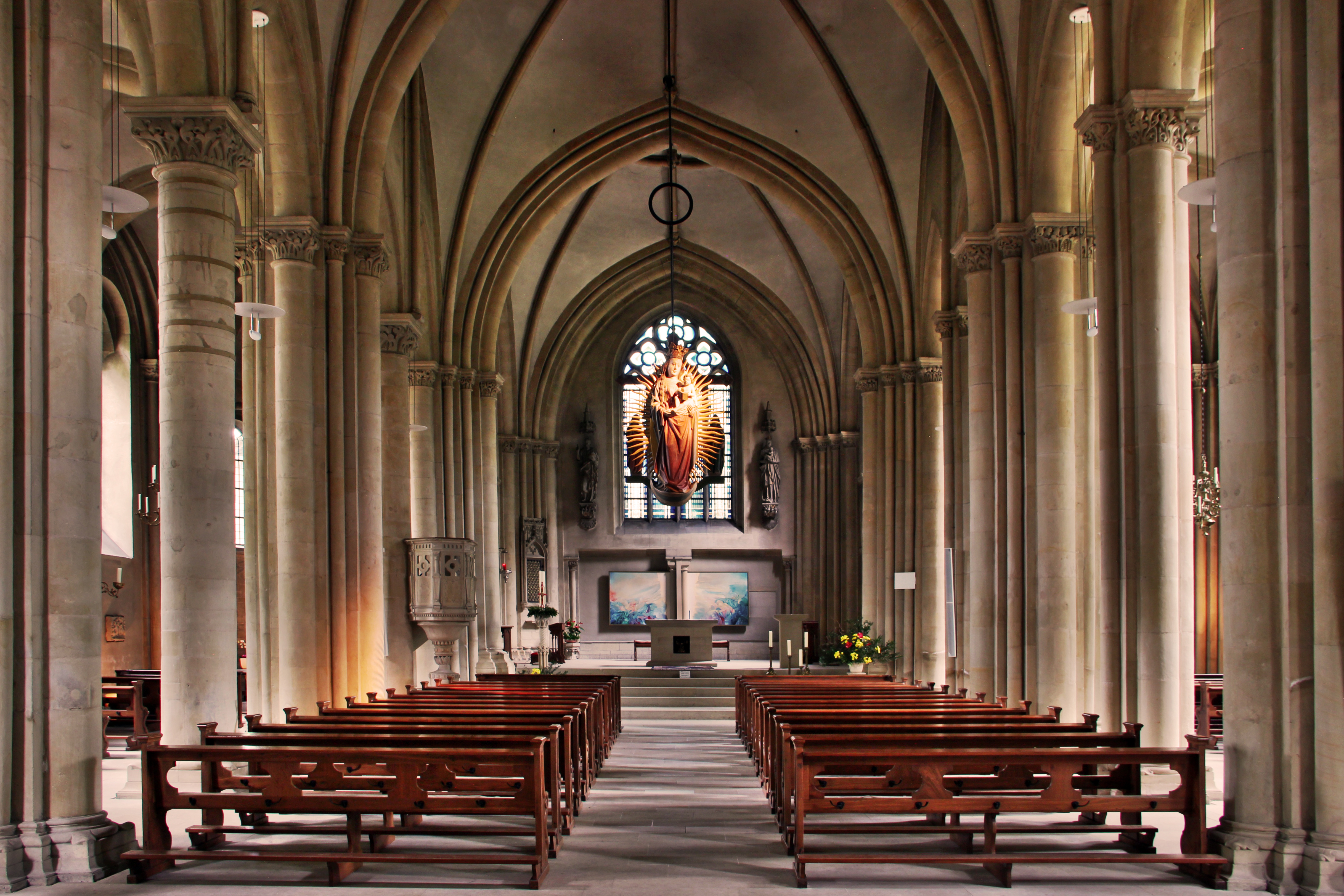 St. Johannes Billerbeck, Innenansicht zum Chor